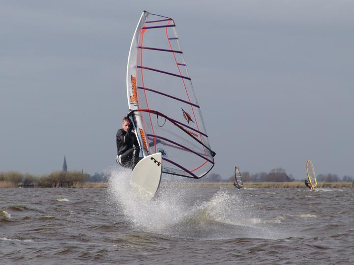 Categorie:Afbeelding watersport